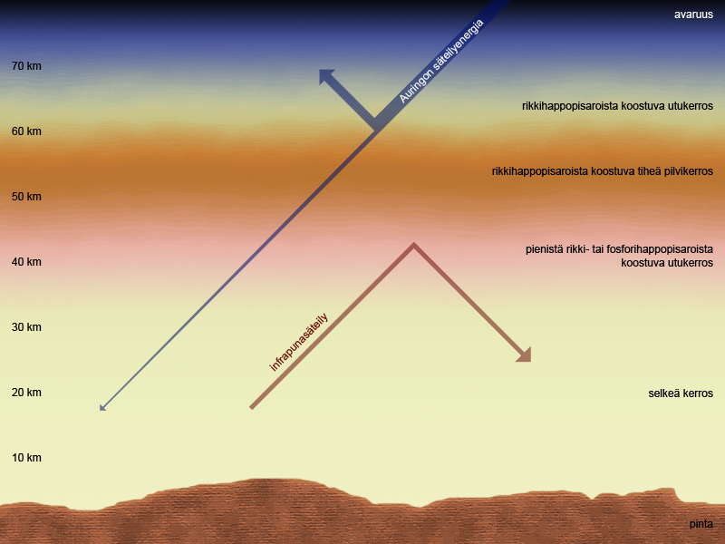 Kaavakuva Venuksen kaasukehän rakenteesta ja kasvihuoneilmiön synnystä. Kaasukehä päästää pienen osan siihen osuvasta Auringon säteilyenergiasta lävitseen, mutta pinnasta poispäin lähtevä infrapunasäteily heijastuu lähes kokonaisuudessaan takaisin lämmittäen pintaa.